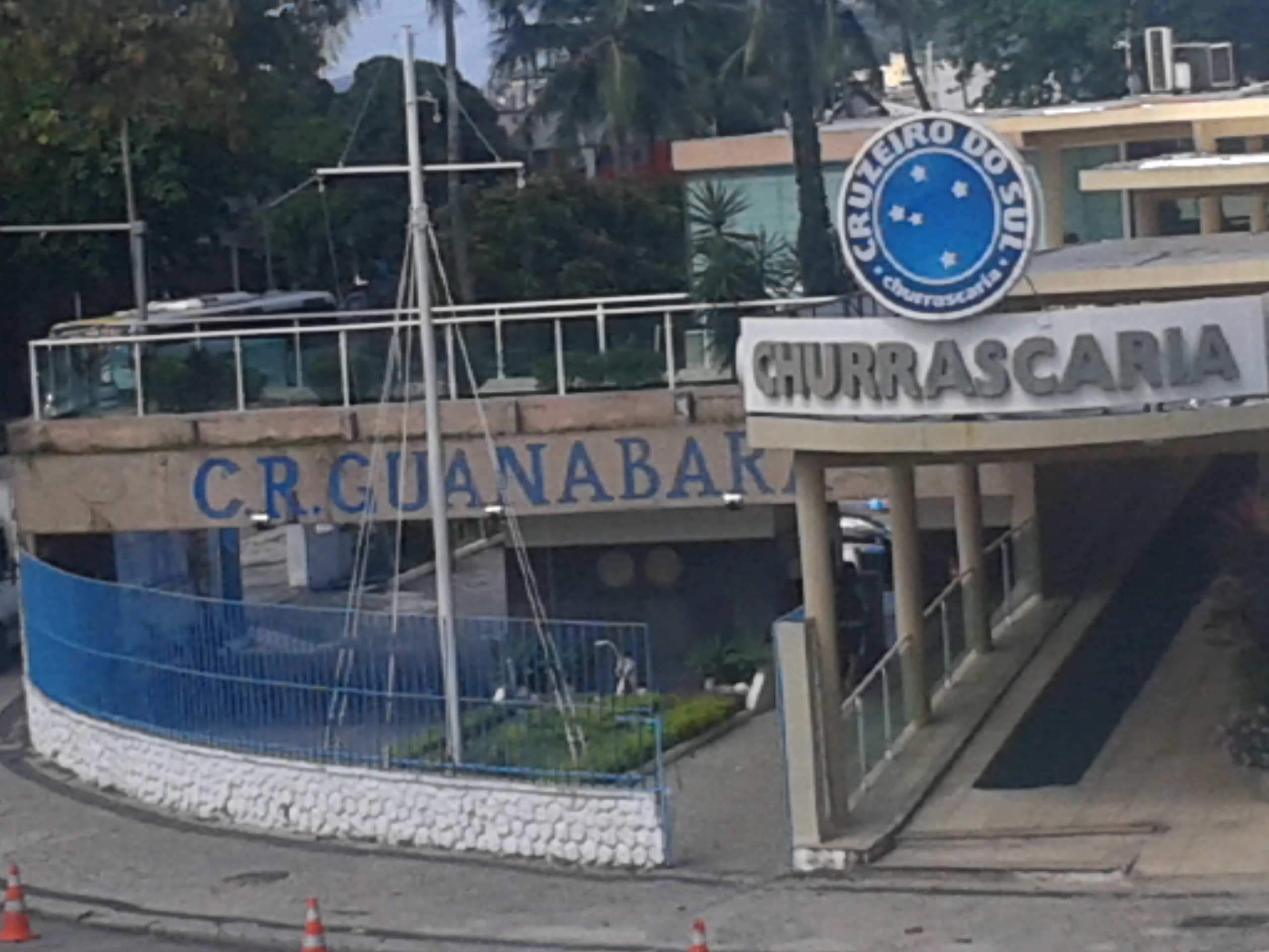 Porta de Entrada - Clube de Regatas Guanabara - Botafogo - Rio de Janeiro - Brazil